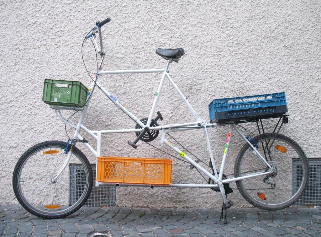 Lastentallbike